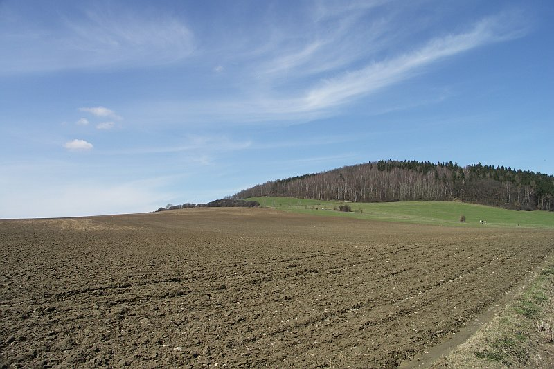 Breiteberg Zittau Mountains